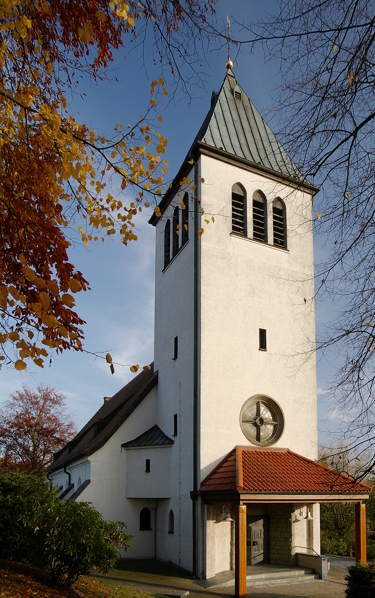 Katholische Kirche Christ-König in Fröndenberg-Warmen, Nordrhein-Westfalen, Deutschland.